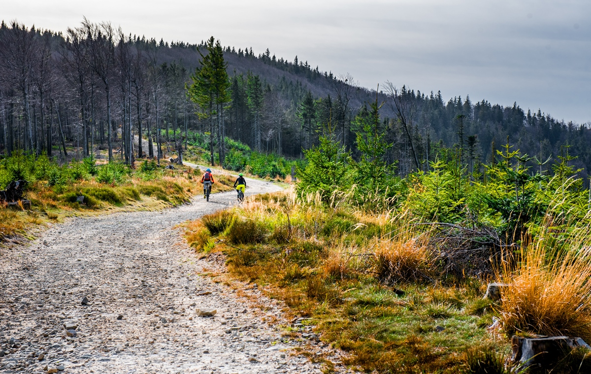 Bielsko-Biała szlak Szyndzielnia-Klimczok